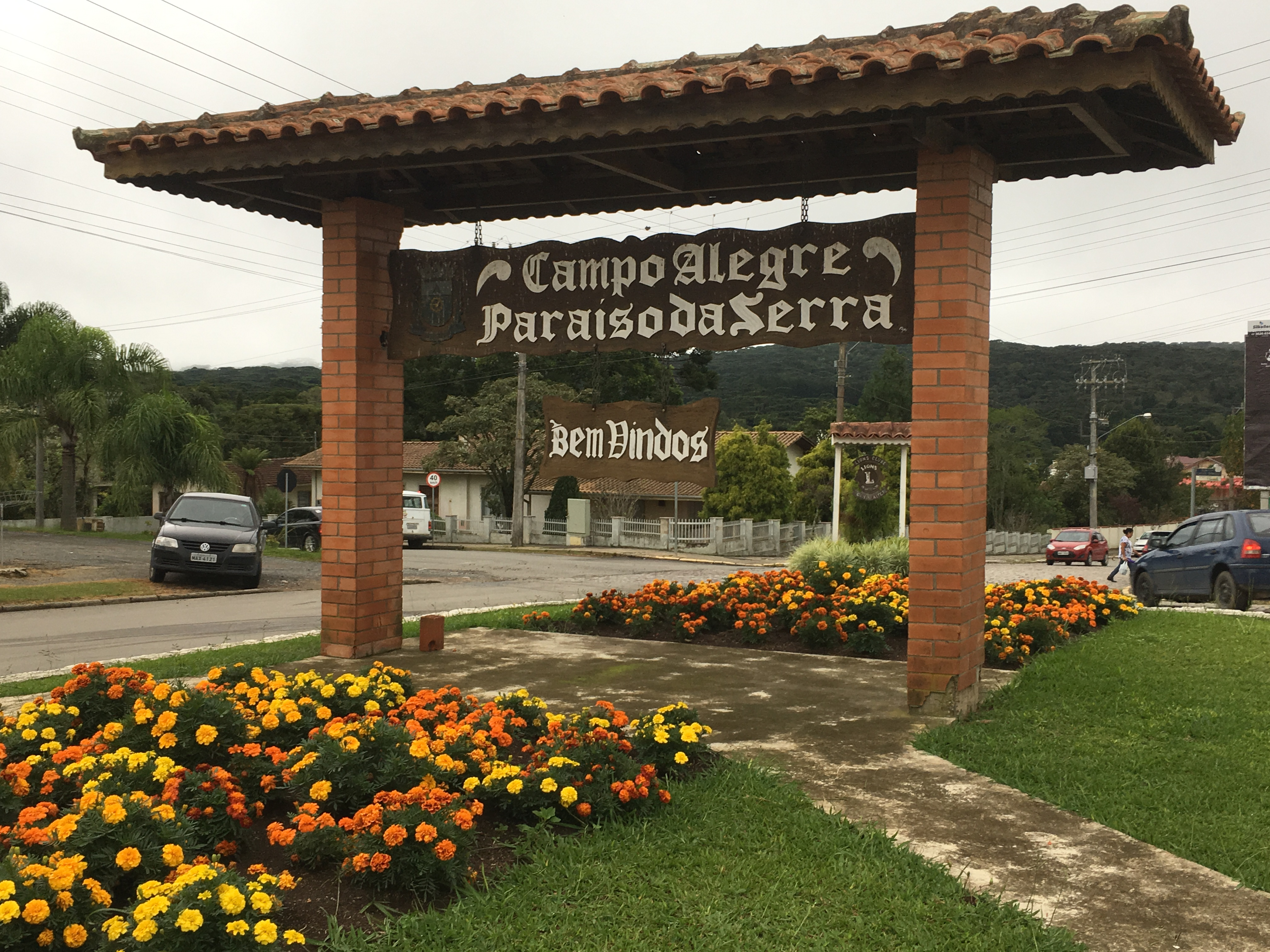 Pórtico de Campo Alegre, SC